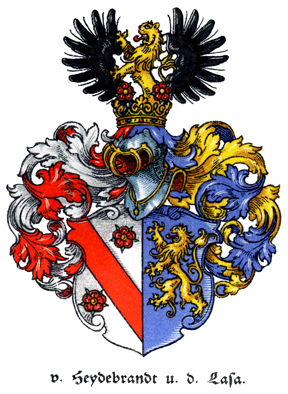 Wappen der Familie von Heydebrandt (Heidebrand, Heydebrand und der Lasa).